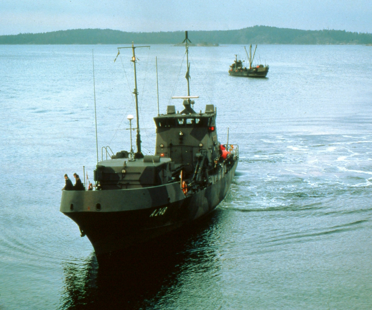 HMS Pingvinen A248 (1973), ett tidigare ett torped- och robotbärgningsfartyg i svenska flottan. IDENTIFIKATIONSNUMMER B35:18